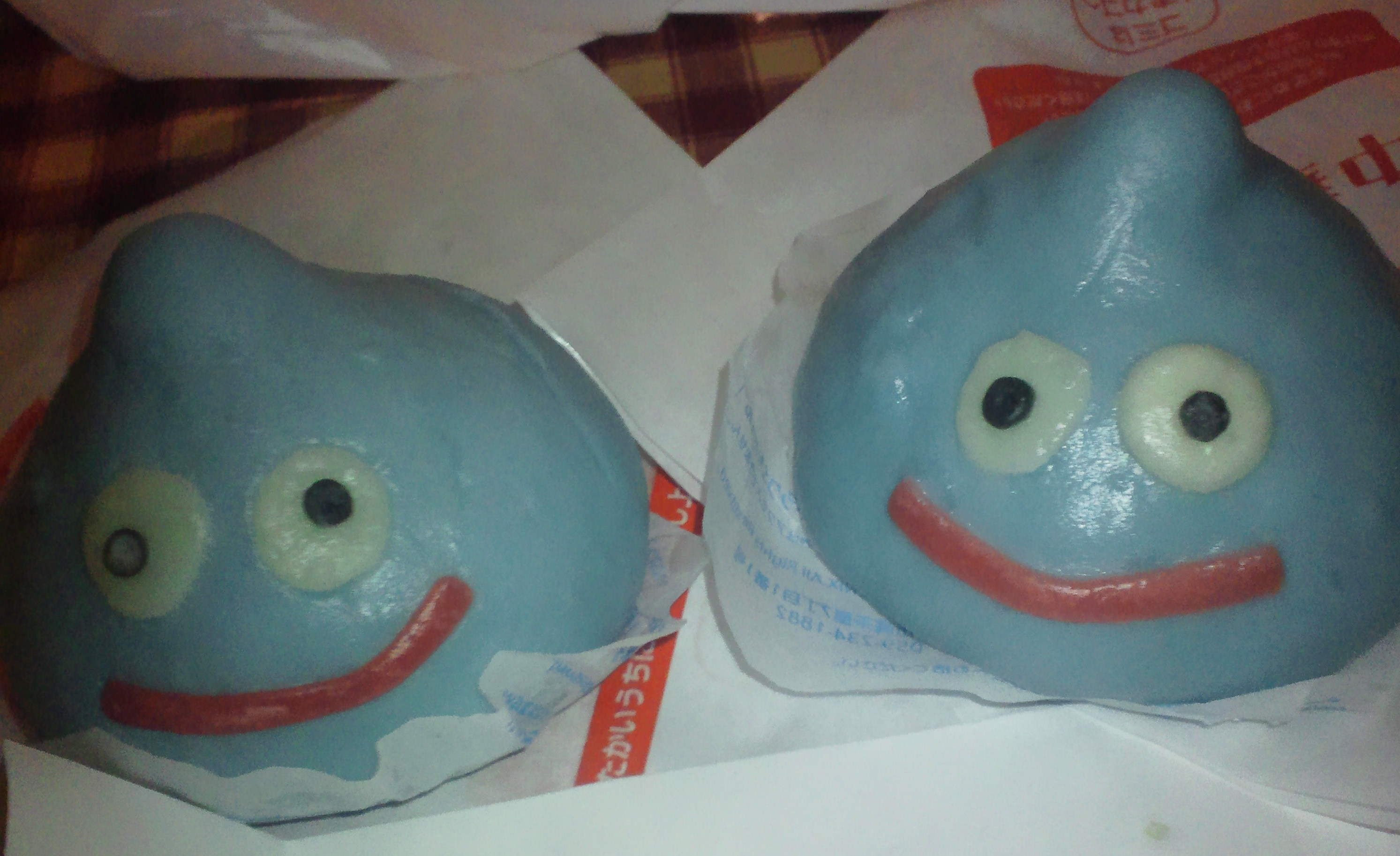 中身しかなかったのでスライム肉まんの全体